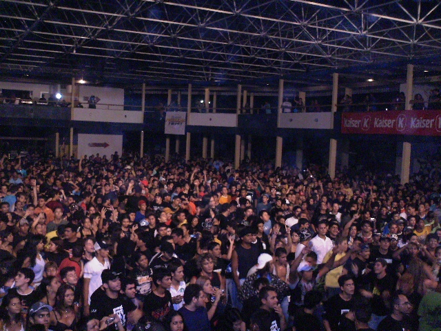 Show dos Raimundos, em Roraima